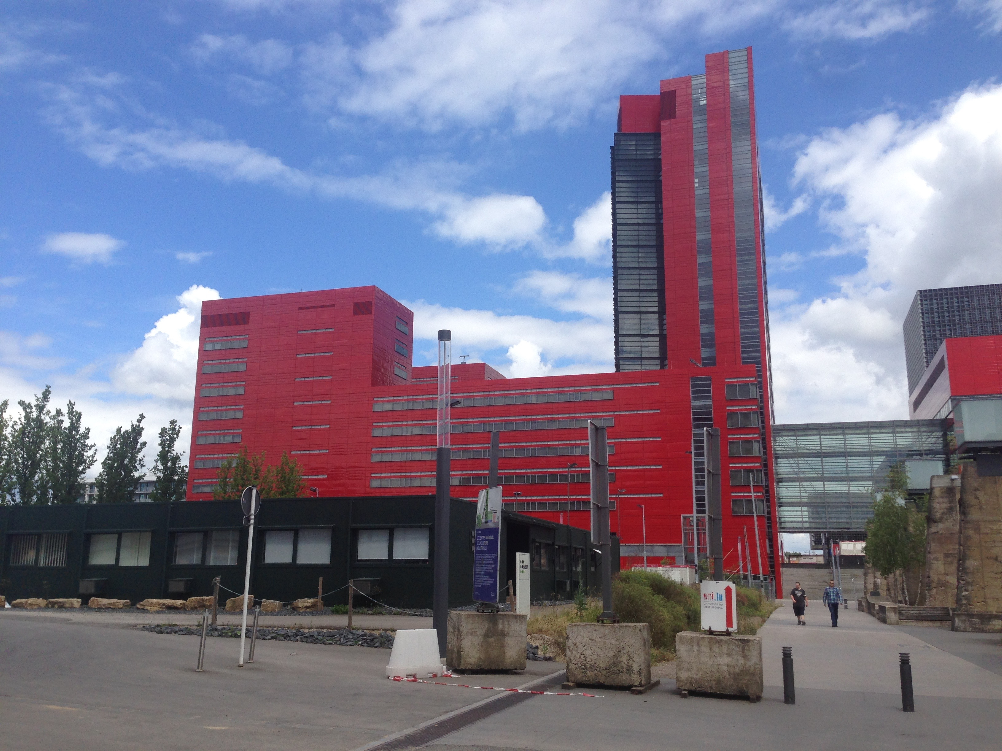 Universität Luxemburg in Esch an der Alzette